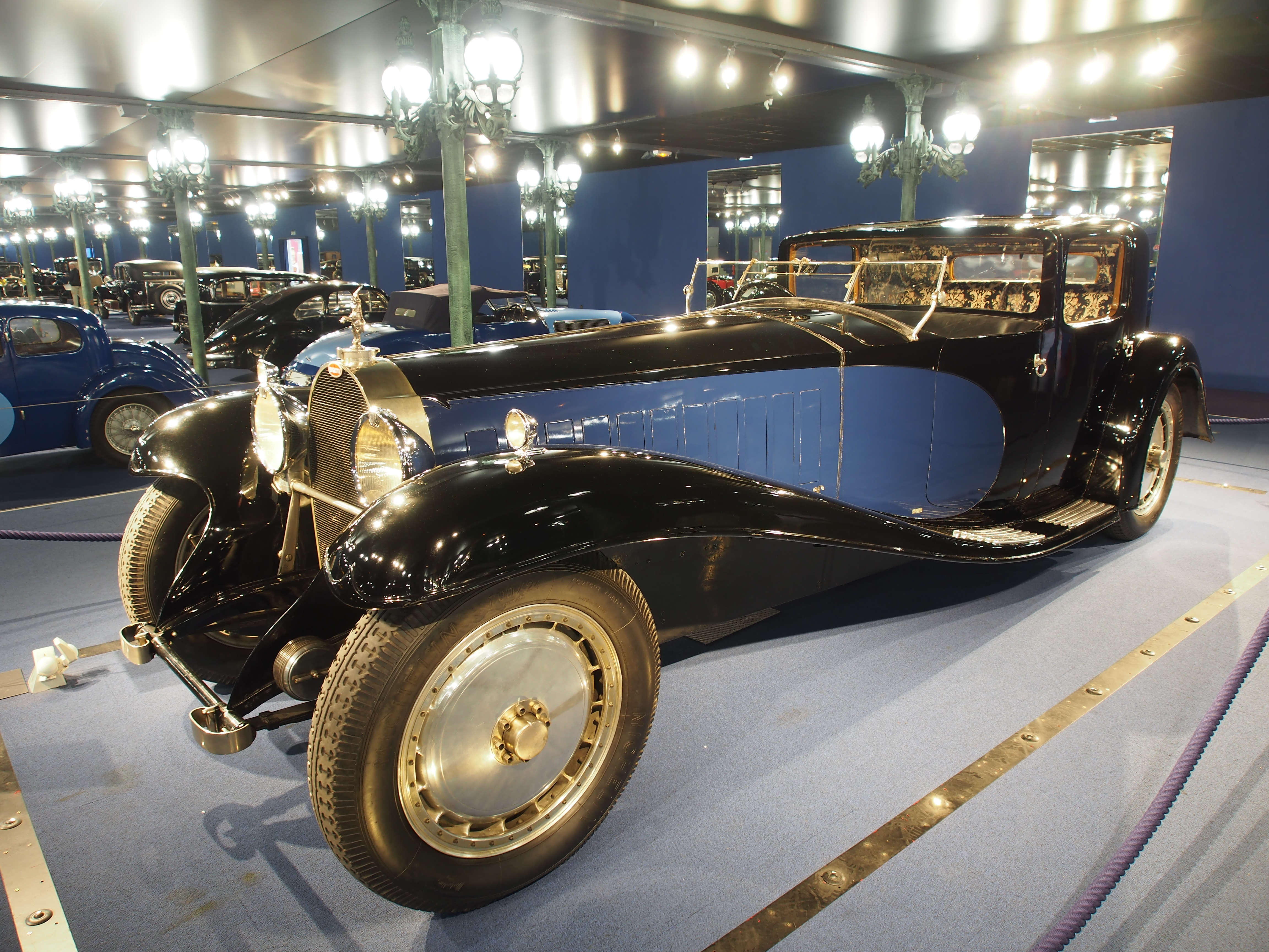 Photographed at Musée National de l'Automobile, France.